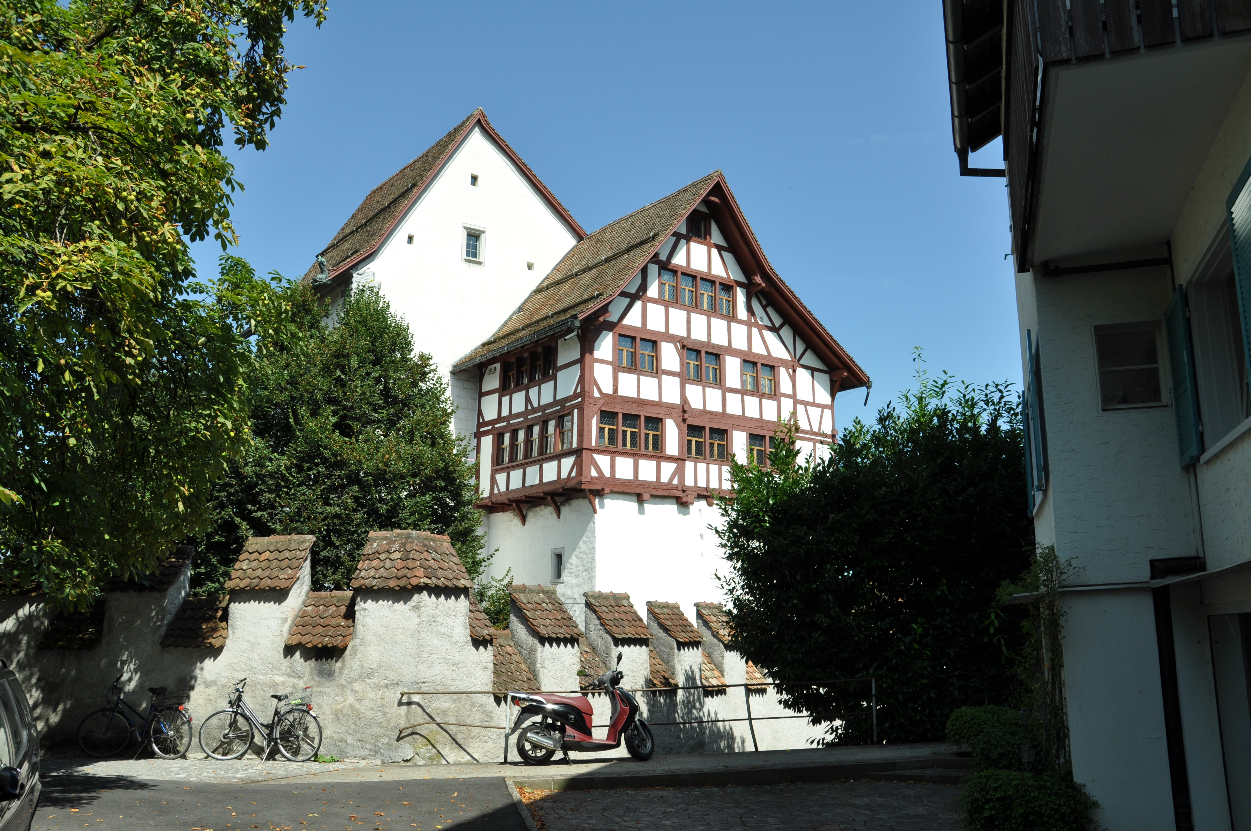 Burg Zug und Museum